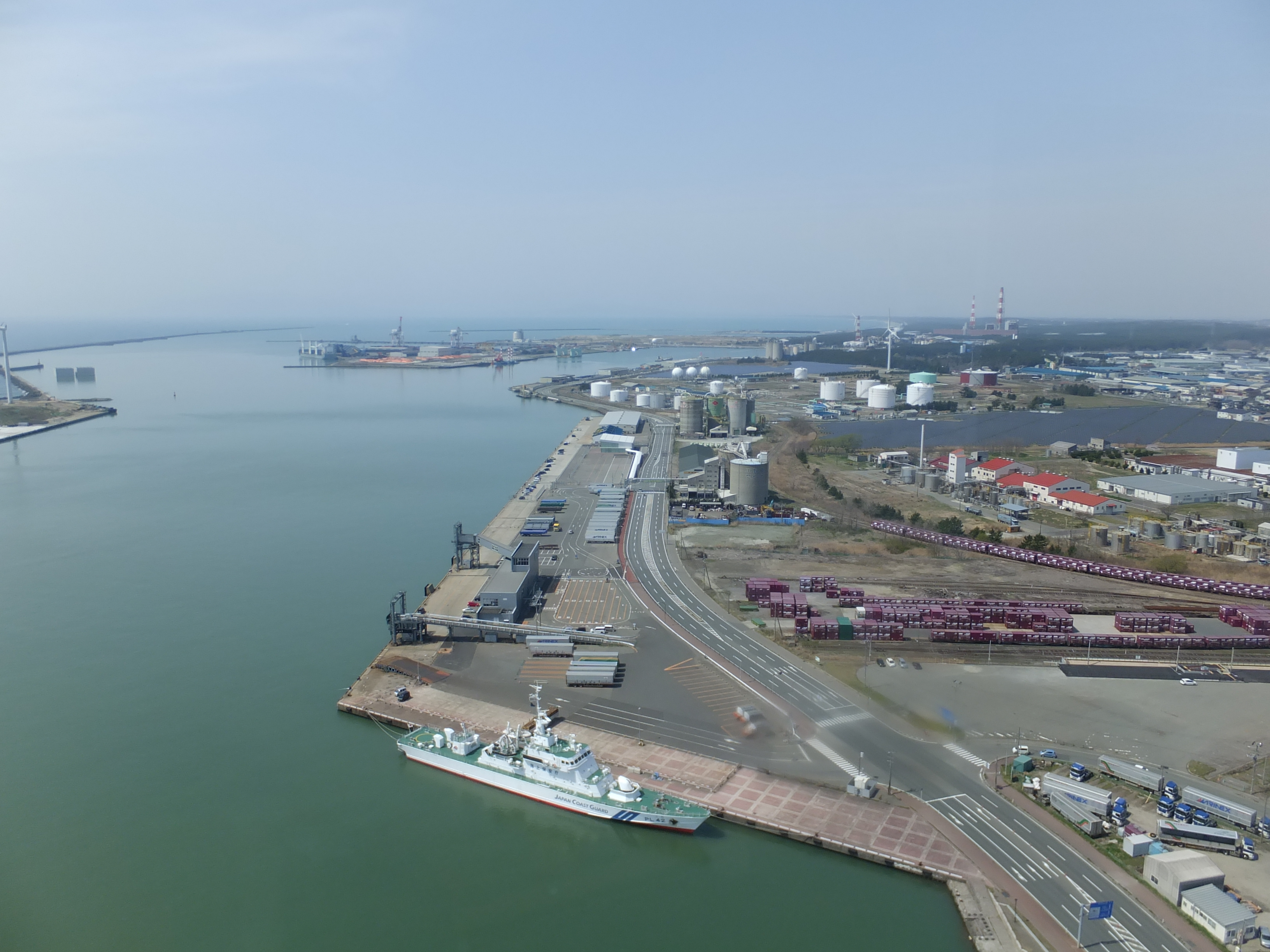 秋田ポートタワー・セリオンより